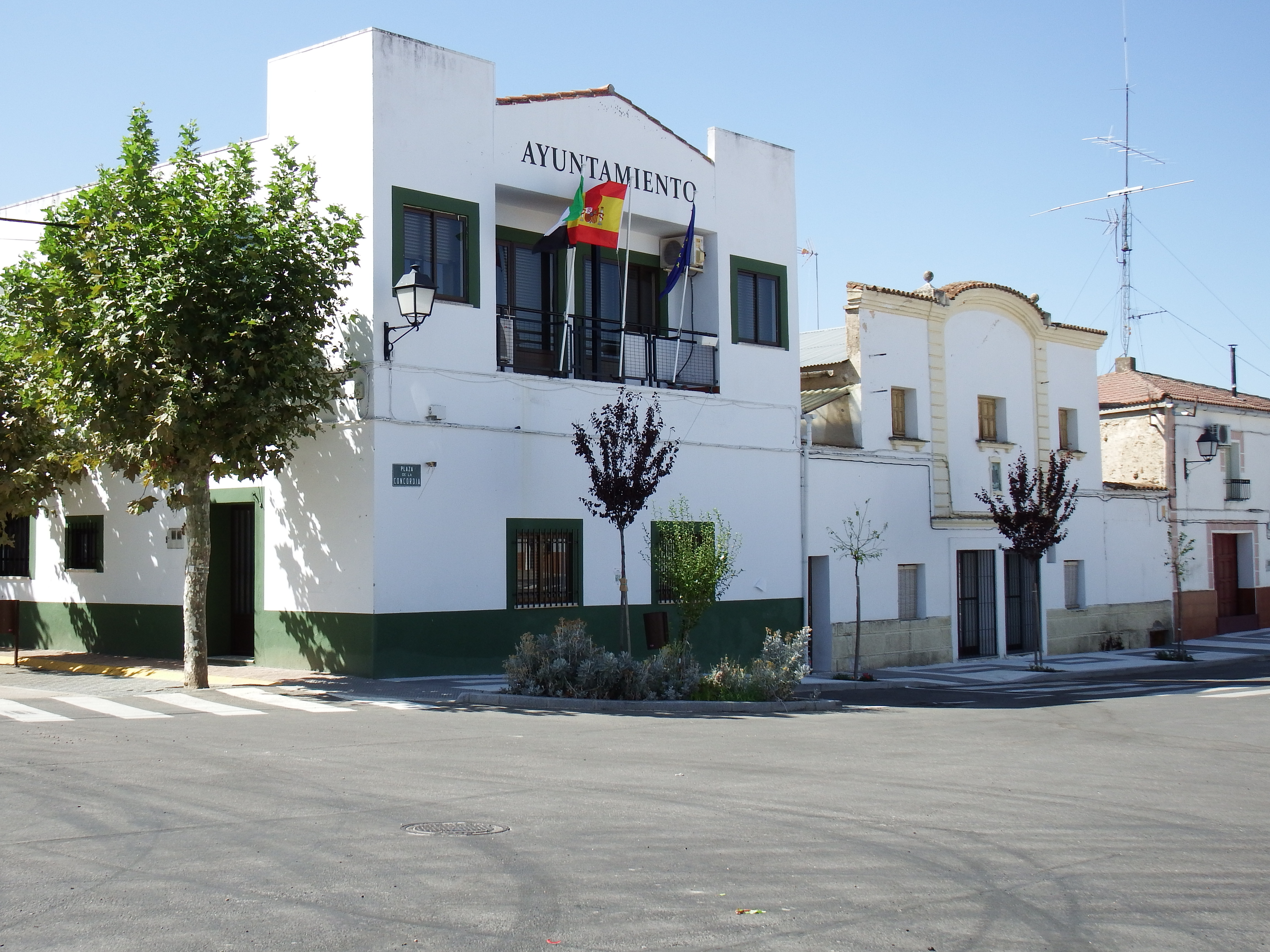 Piedras Albas, Cáceres